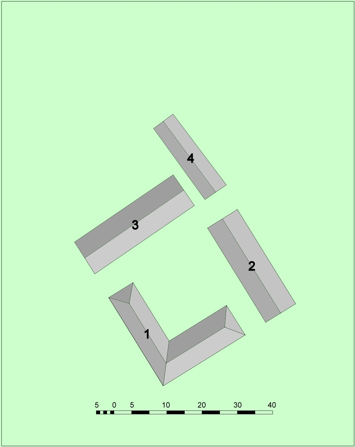 Berlin - Schloss Glienicke, Situationsplan 1806